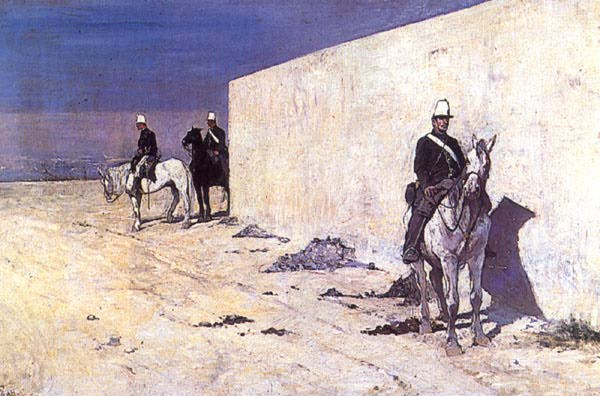 Riproduazione del quadro "In Vedetta" di Giovanni Fattori